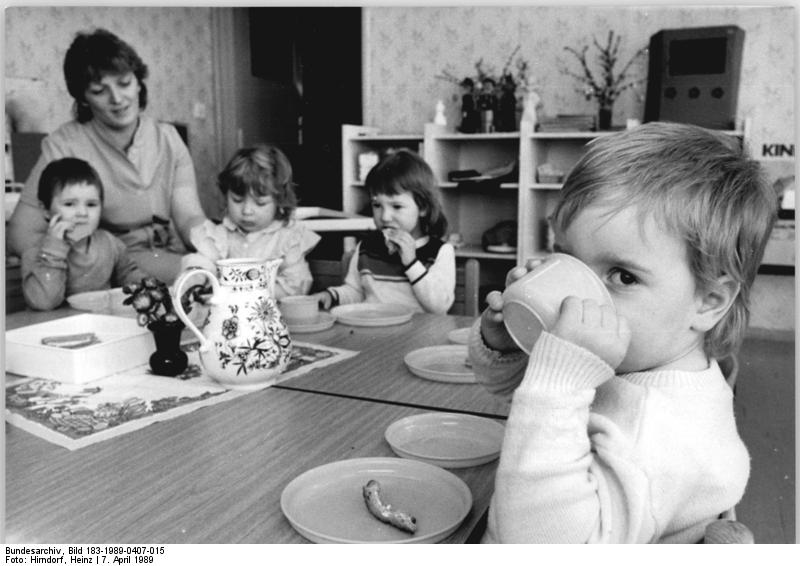 Kramsdorf, Krippenkinder beim Essen ADN-ZB Hirndorf 7.4.89 Bez. Erfurt: Wahl - Den Kleinen schmeckts in der neuen Kinderkrippe von Kramsdorf. Die Einrichtung entstand in territorialer Gemeinschaftsarbeit zwischen der LPG (P) Tal des Friedens und dem Rat der Gemeinde auf der Grundlage eines Kommunalvertrages. 36 Kinder der Gemeinde im Kreis Weimar werden in der Krippe fürsorglich betreut. siehe auch 1989-0407-16, 17 und 18N